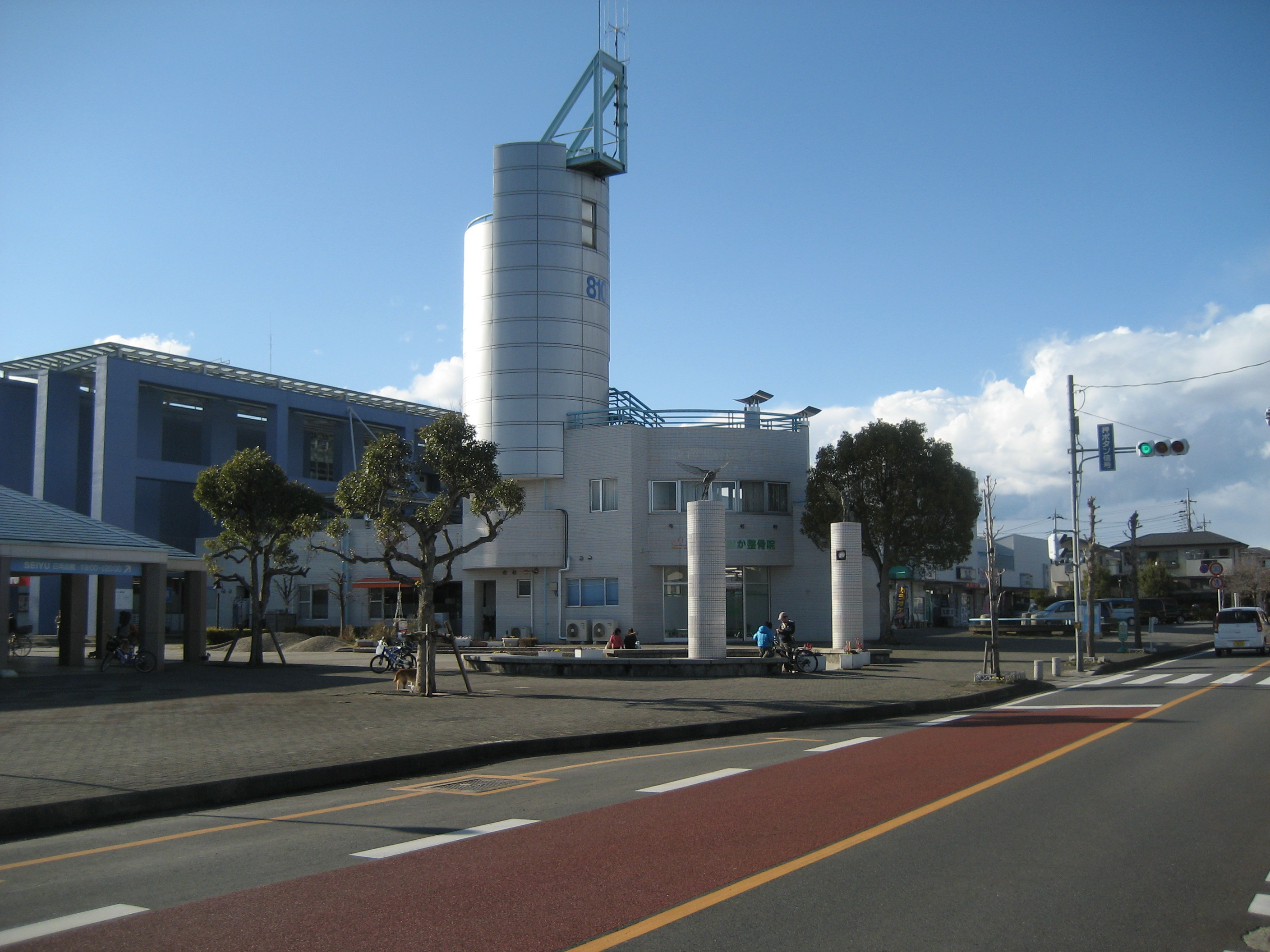 鳩山ニュータウン 鳩山町役場東出張所付近